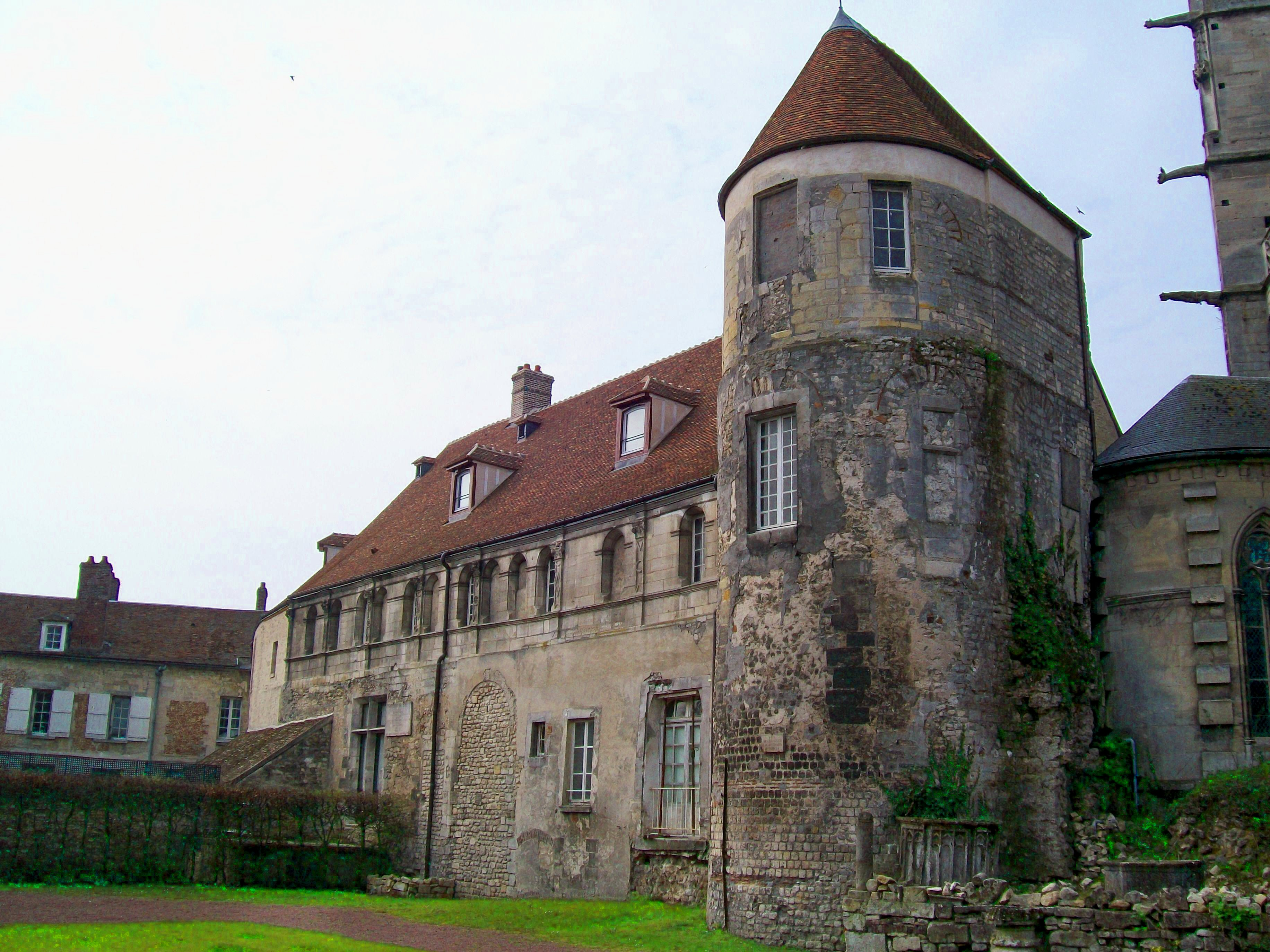 Façade nord-est de l'ancien évêché depuis la rue aux Flageards, avec la tour n° 4 ou « tour des Anges » et vestiges de l'enceinte gallo-romaine.